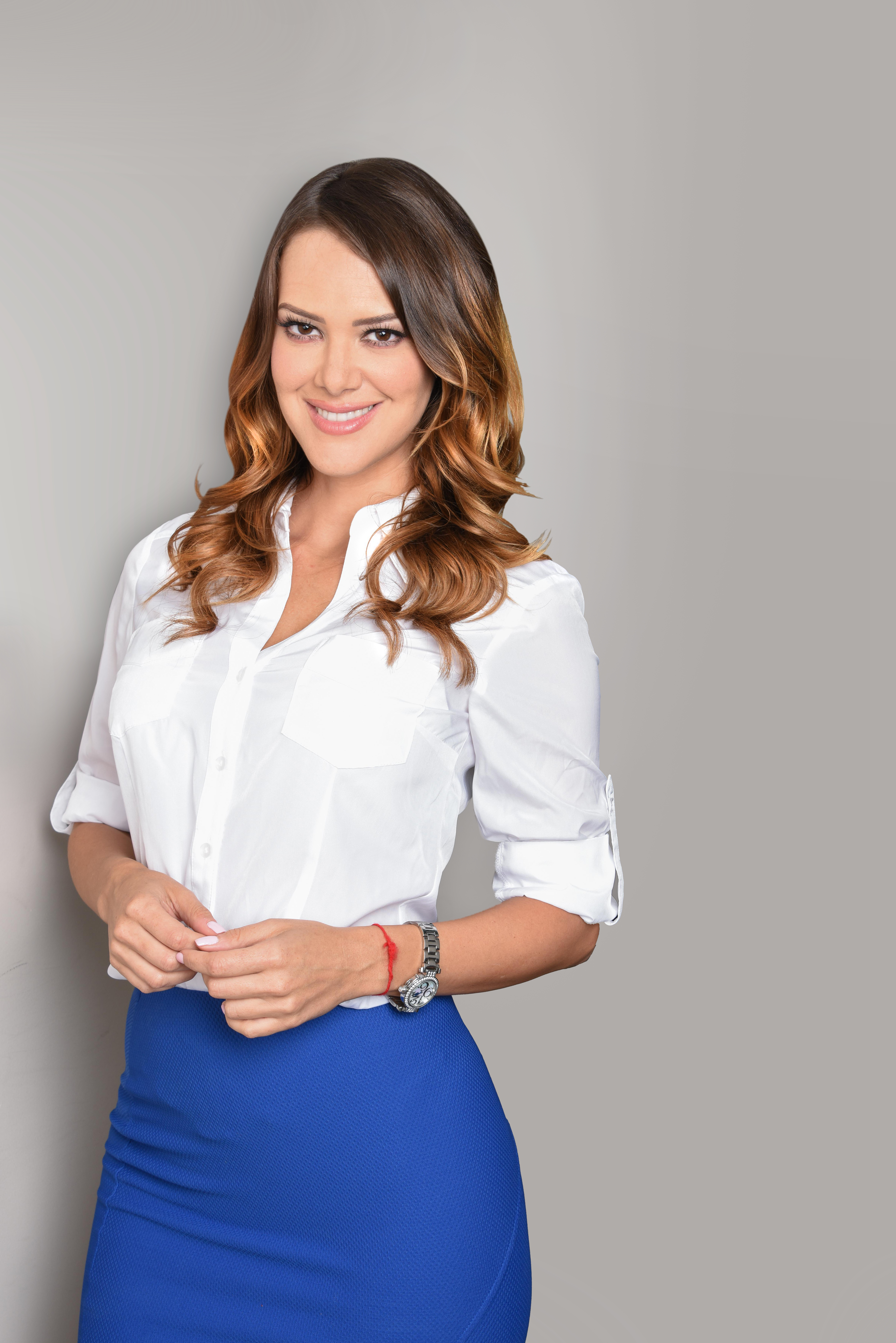 Actriz, modelo y empresaria venezolana Patricia Ramos